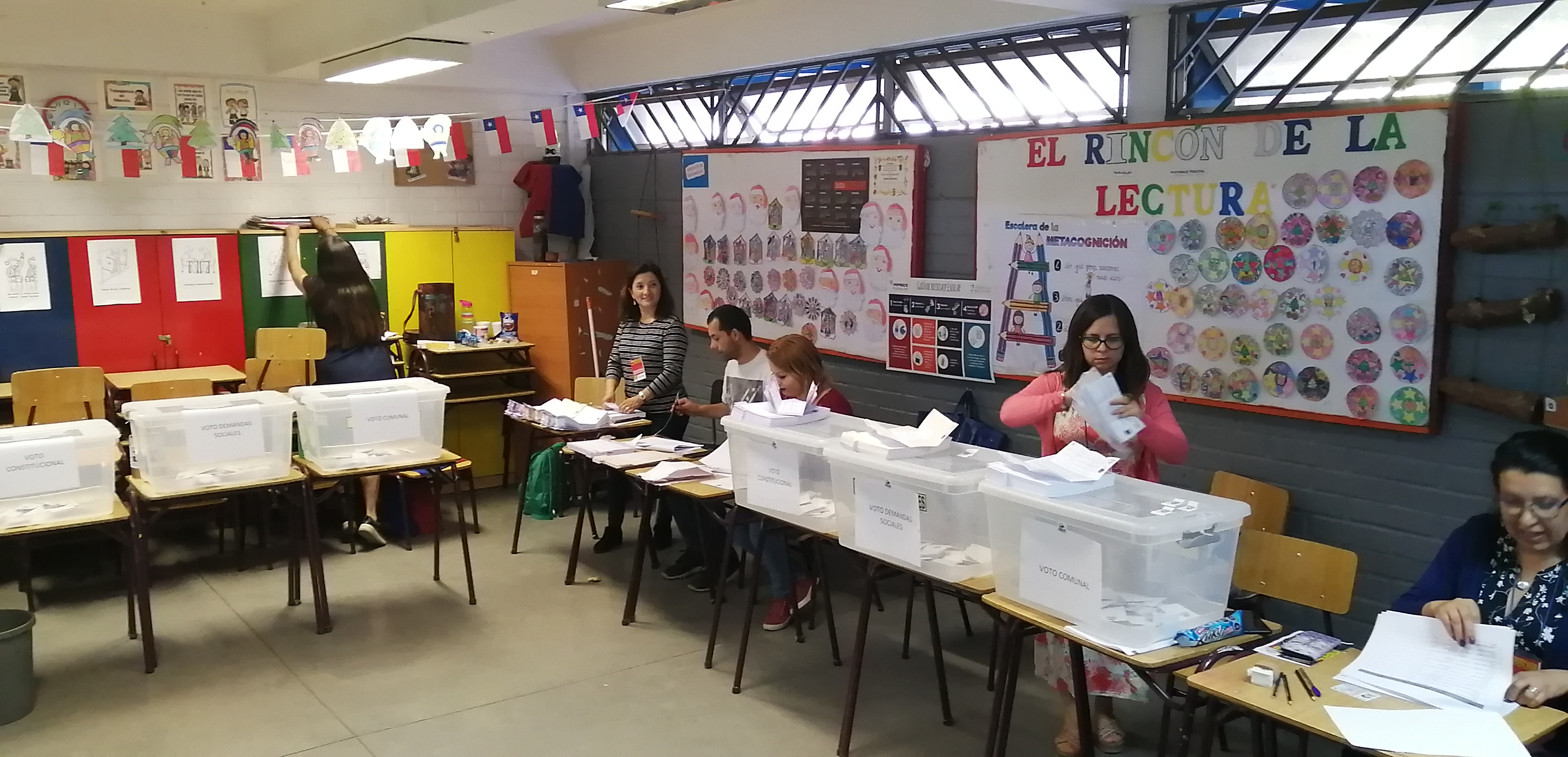 Mesas de votación en la comuna de Cerrillos durante el proceso de la Consulta Ciudadana de Chile de 2019.